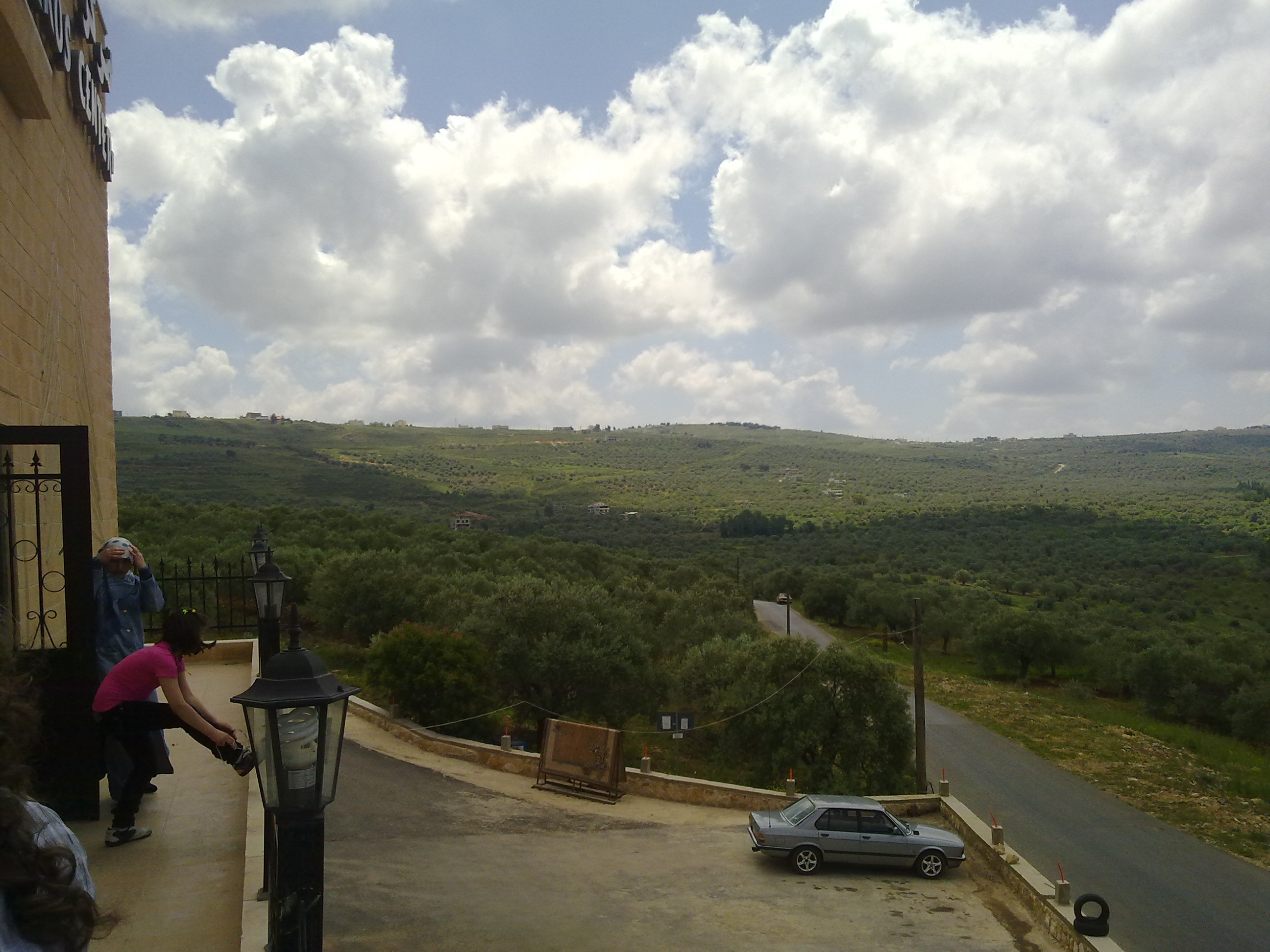 Qlayaa, Lebanon